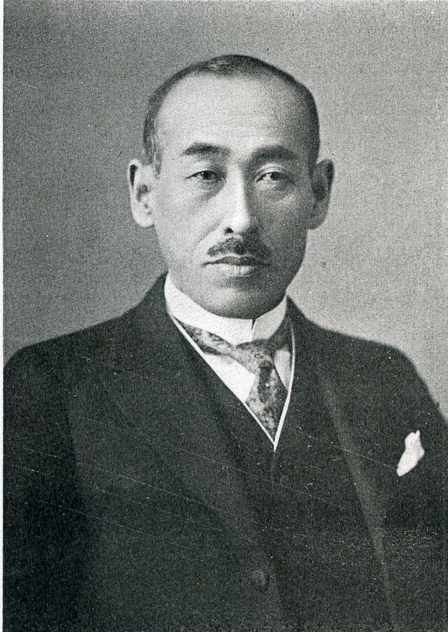 この写真は、丹下茂十郎（1880-1938）の写真です。